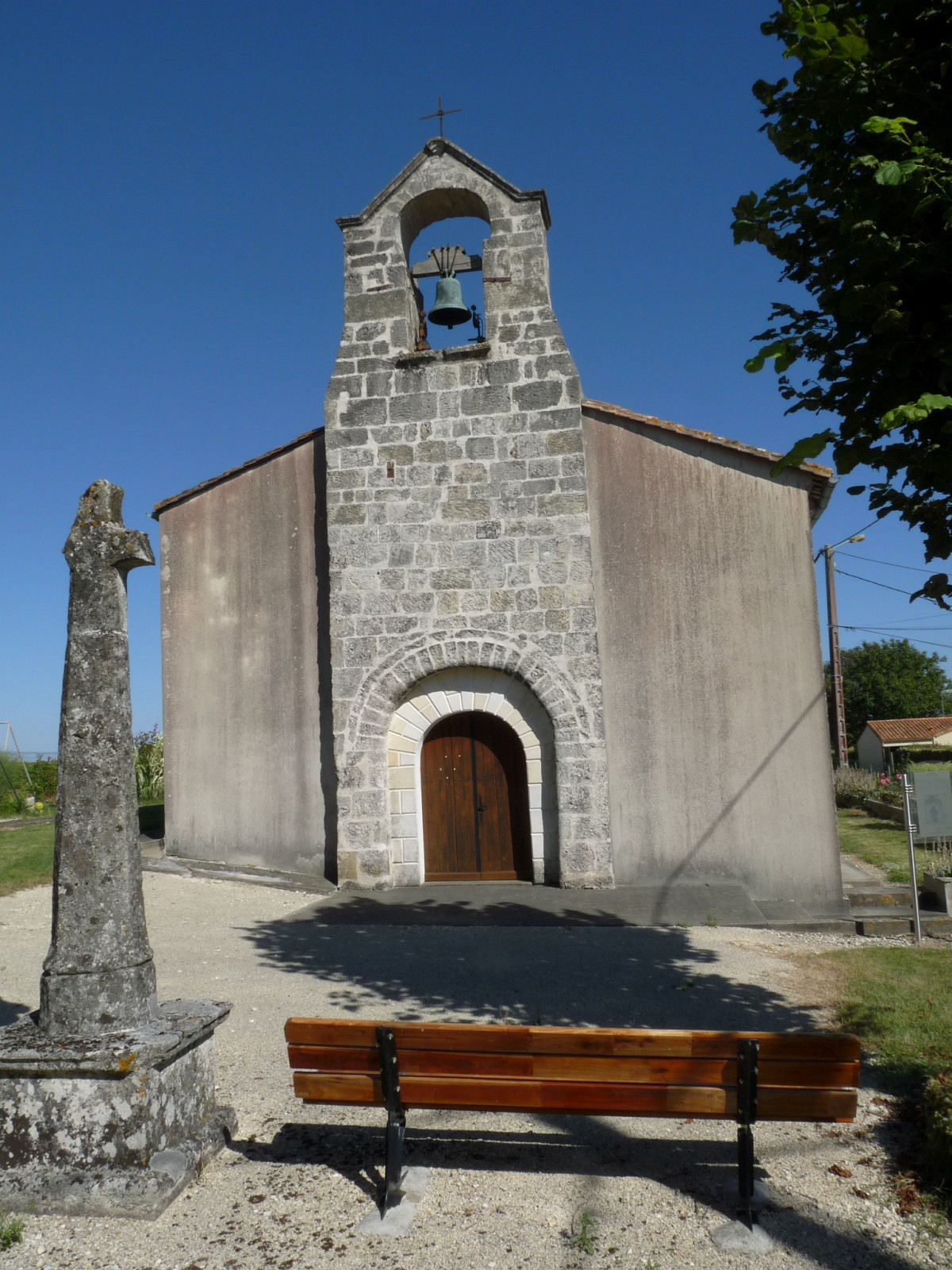 Eglise de Chartuzac, Charente-Maritime, France